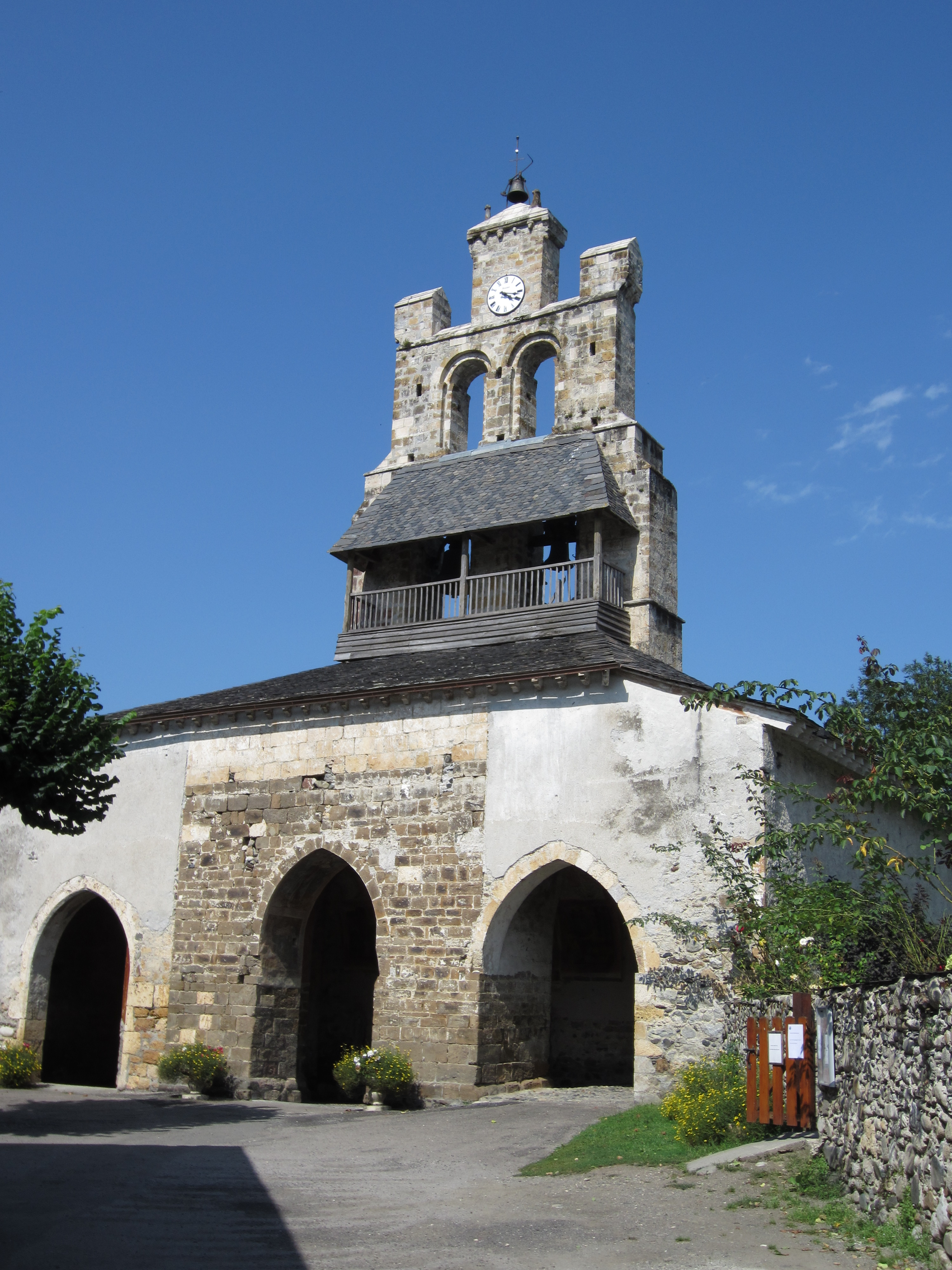 Vue extérieure - porche et clocher-mur .